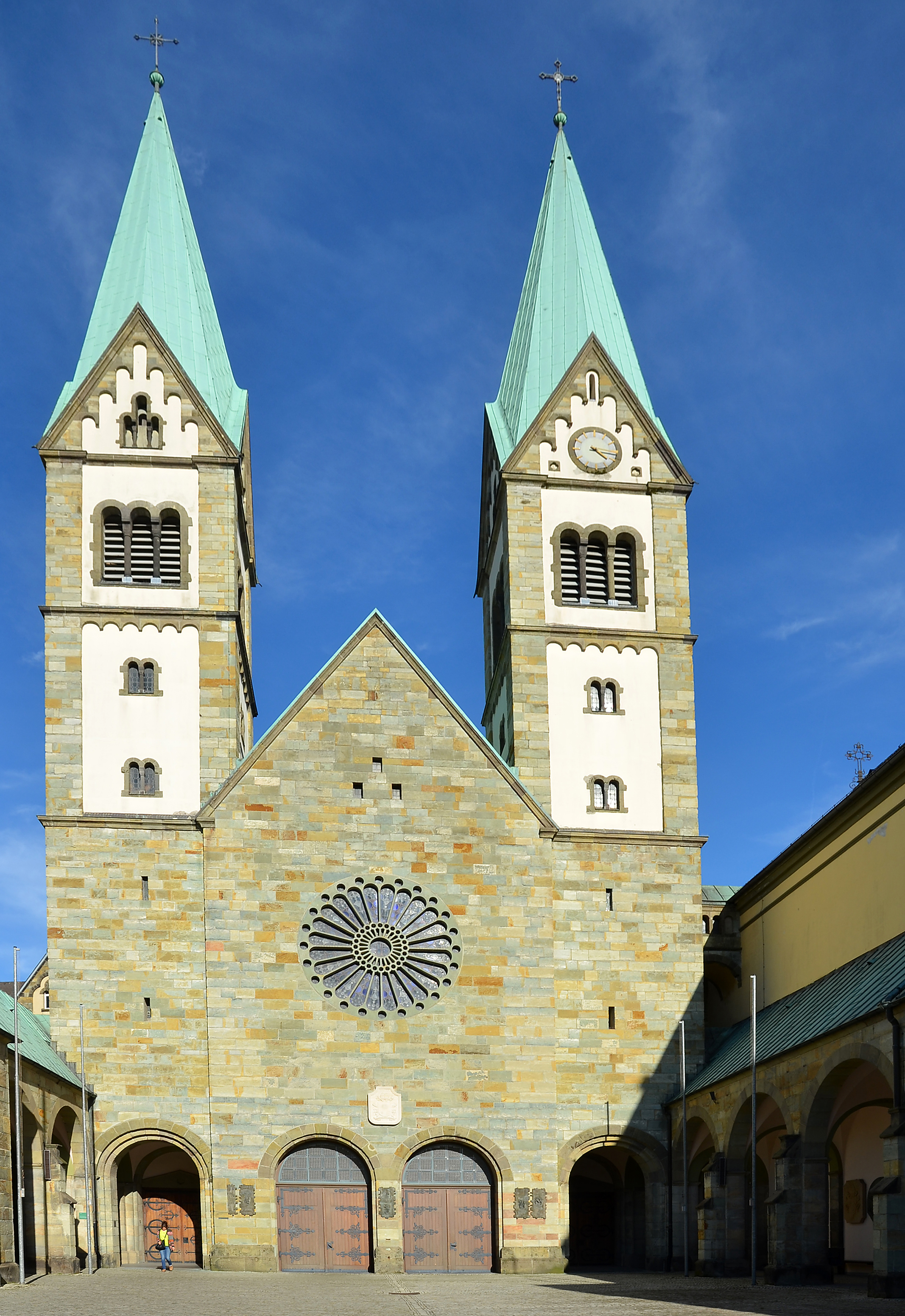 Denkmalgeschützte Basilika Mariä Heimsuchung (Werl), Ansicht vom Vorplatz aus.